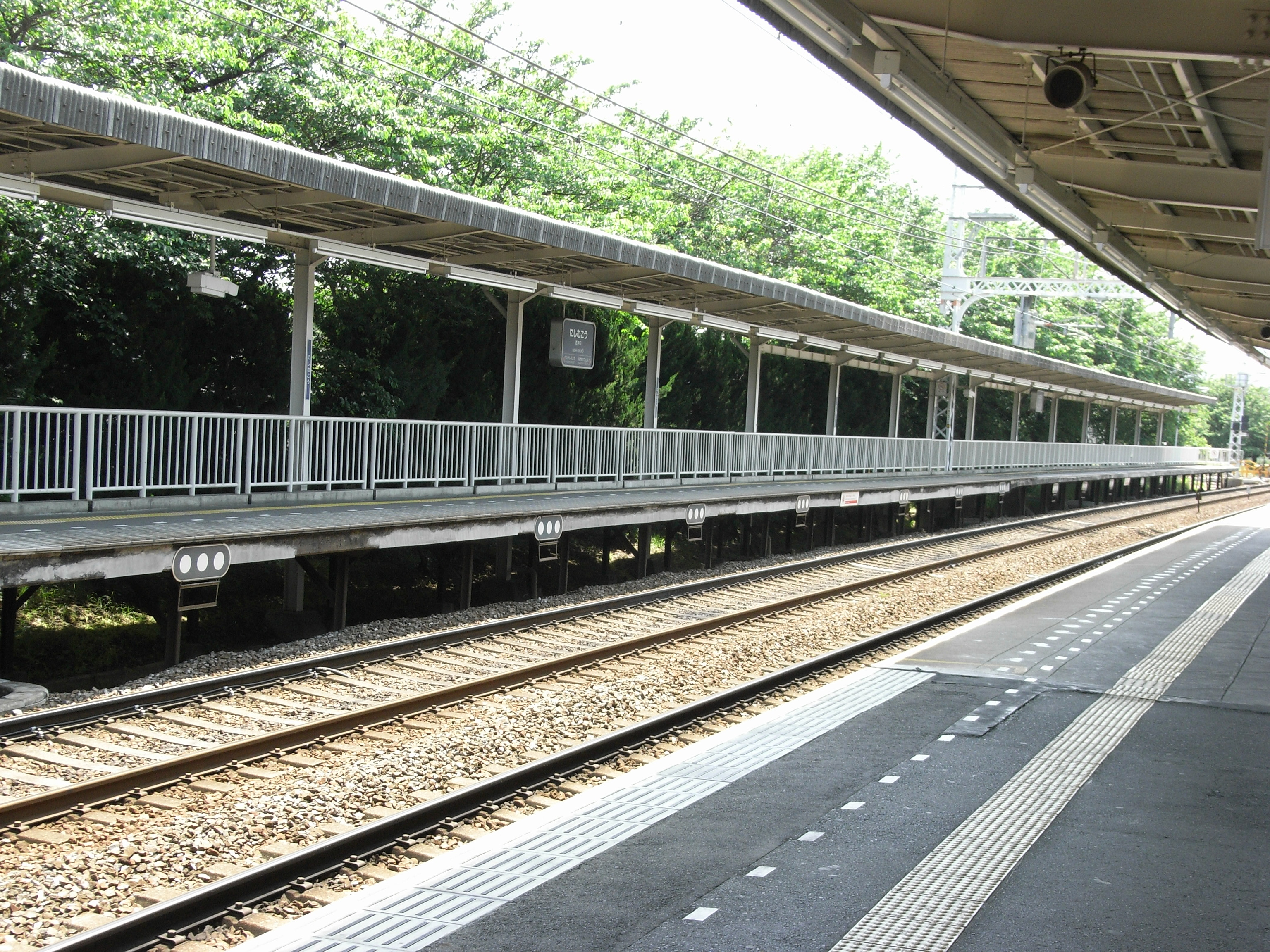 阪急西向日駅